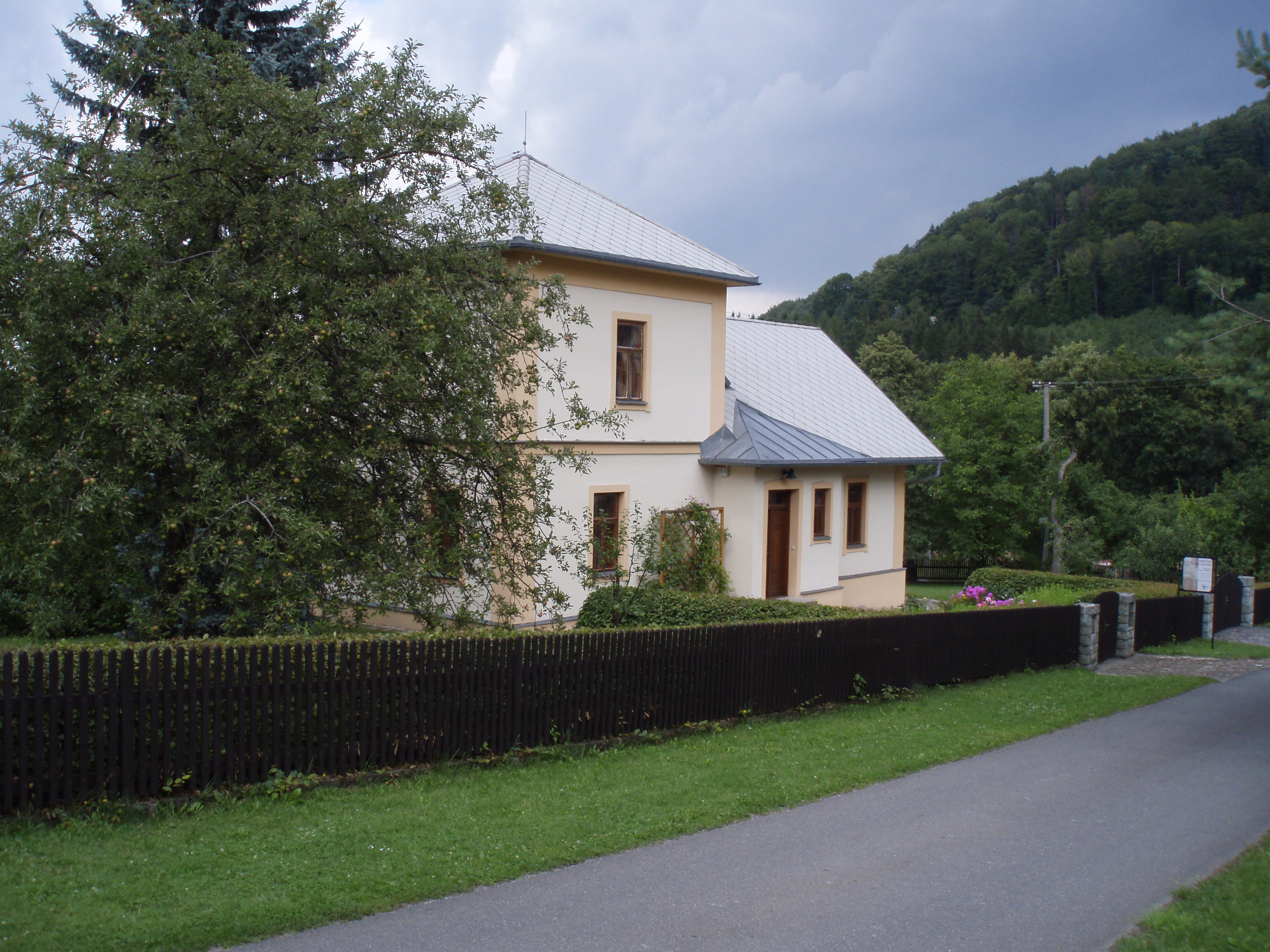 Janáček's retirement home